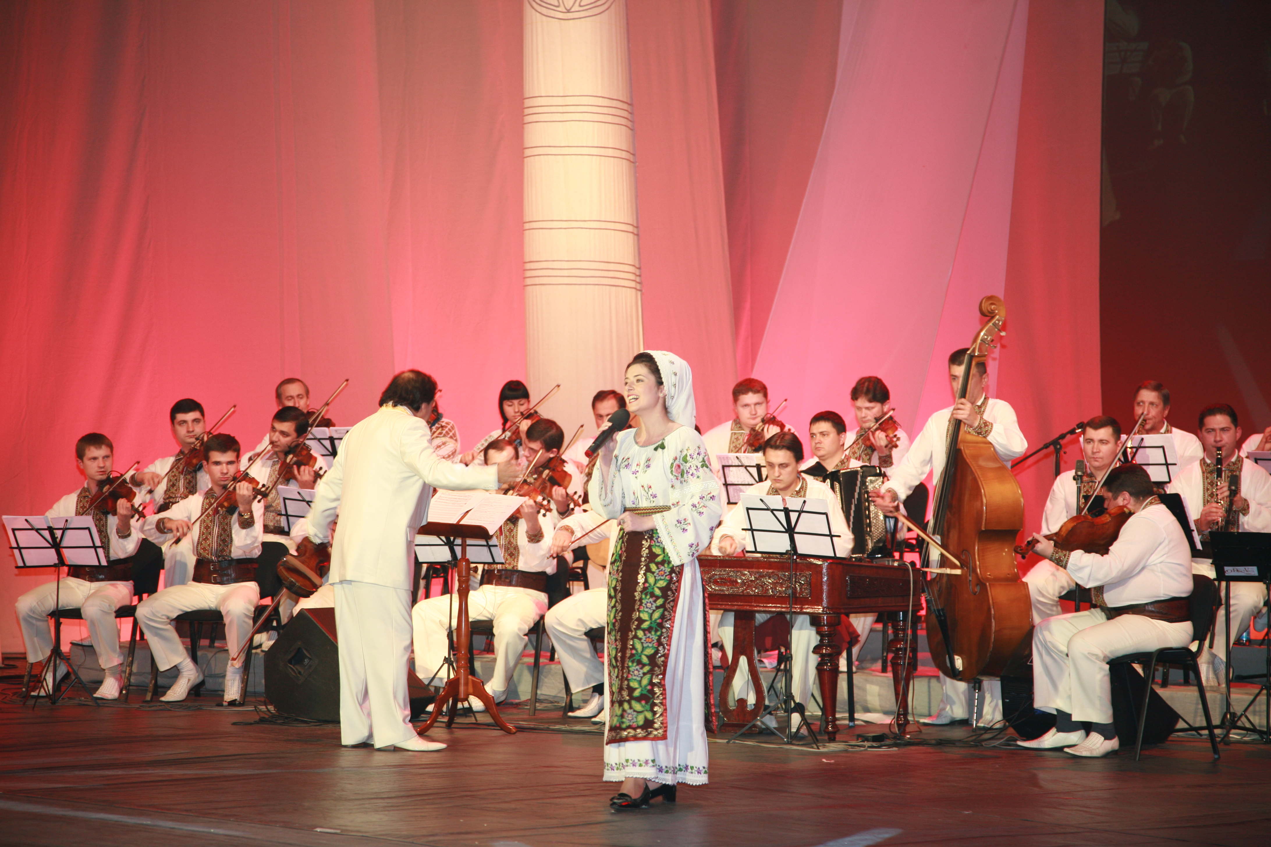 Vocalista Izabela Tomița împreună cu orchestra de muzică populară Lăutarii